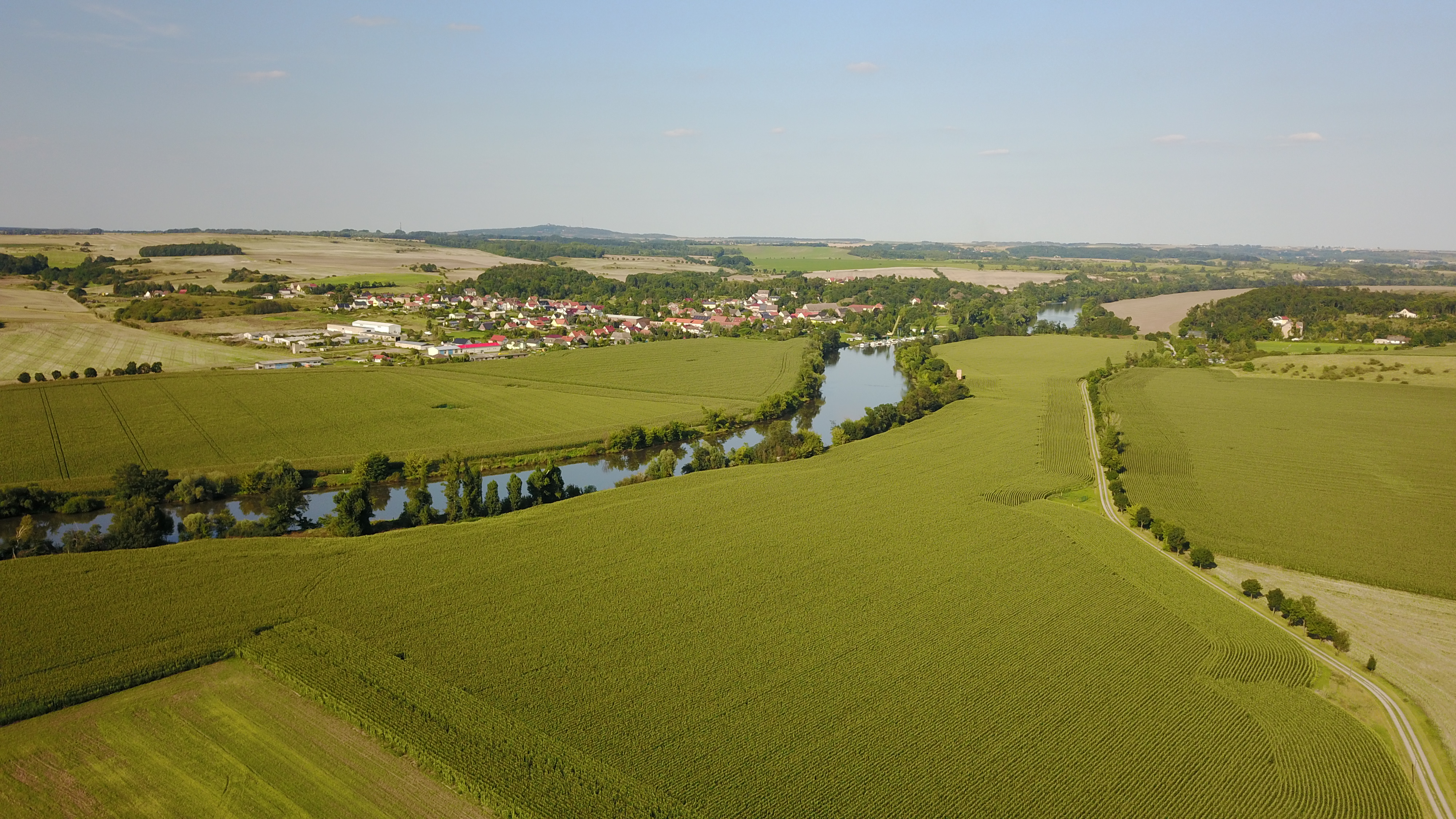 Saale bei der Fähre Brachwitz (links Brachwitz, rechts Neuragoczy, am Horizont der Petersberg)